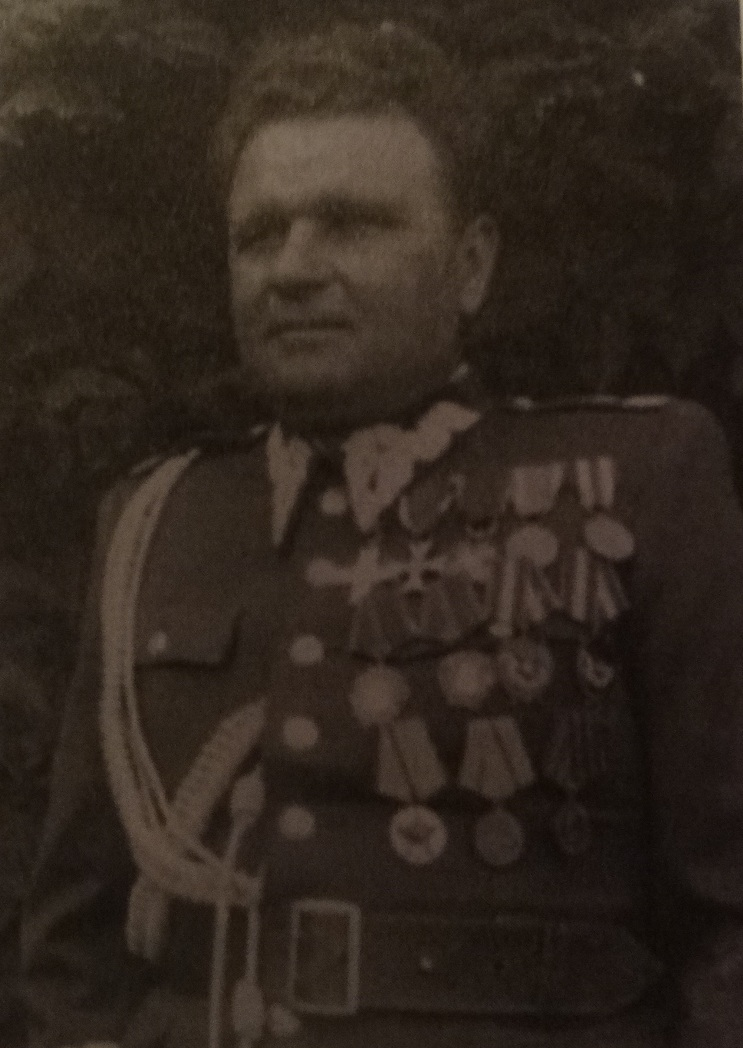 gen. bryg. Wiktor Lemontowicz, d-ca 12DP